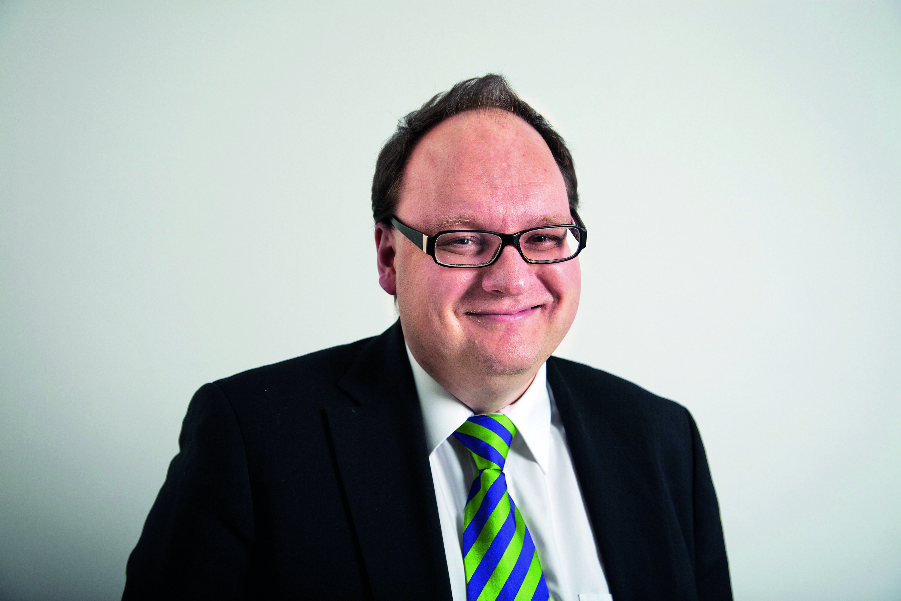 Prof. Dr. Marcus Bölz ist Journalist, Wissenschaftler und Hochschullehrer